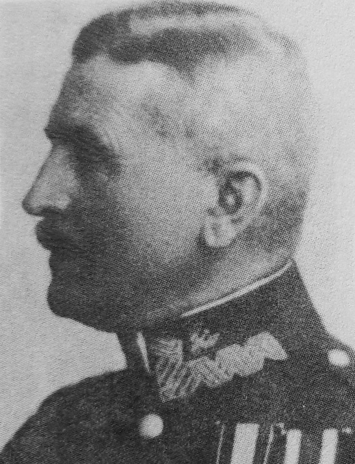 Franciszek Paulik (1866-1940), gen. dyw., kawaler Orderu Virtuti Militari 5 kl., ofiara zbrodni katyńskiej